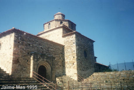 Iglesia de la Virgen de la Peña. Imagen tomada por Jaime Mas en 1995 y licenciada bajo los términos de Copyright de Wikipedia.